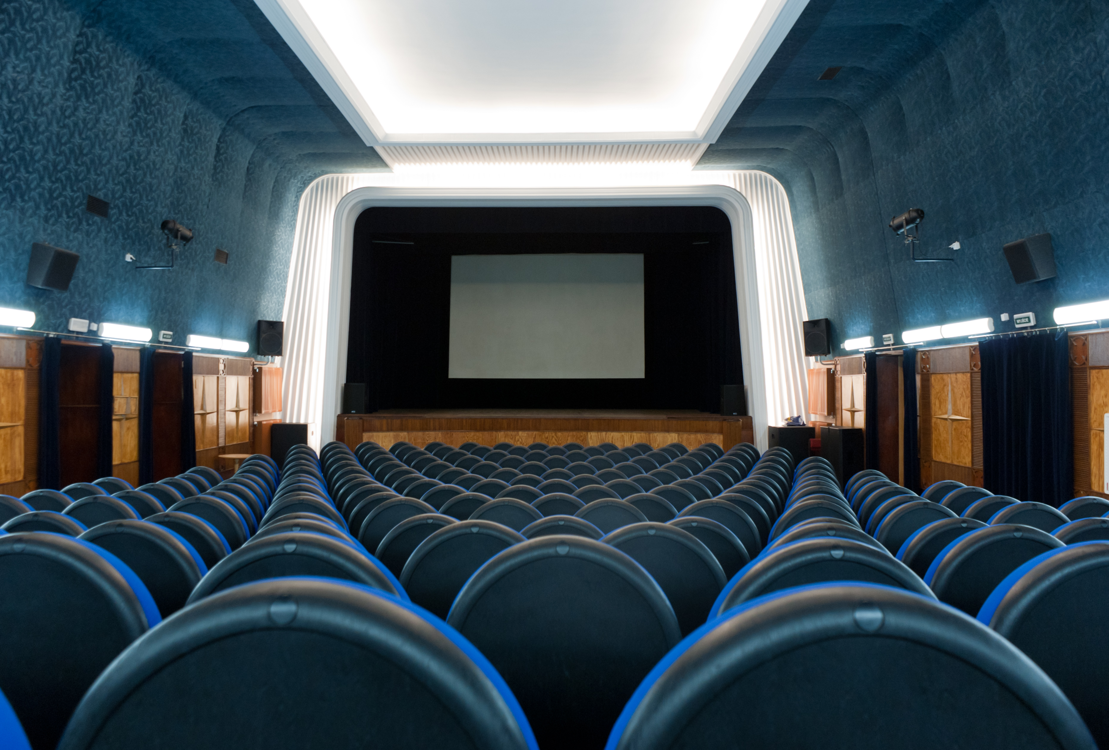 Wnętrze kina Sokół w Rymanowie.